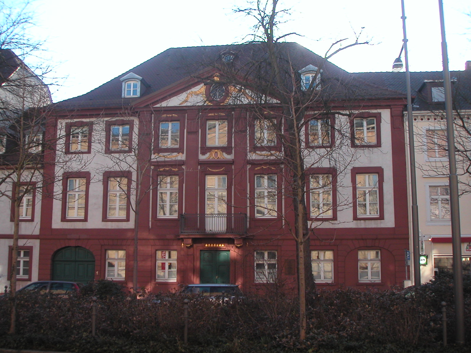 Das Schweden-Palais in Karlsruhe